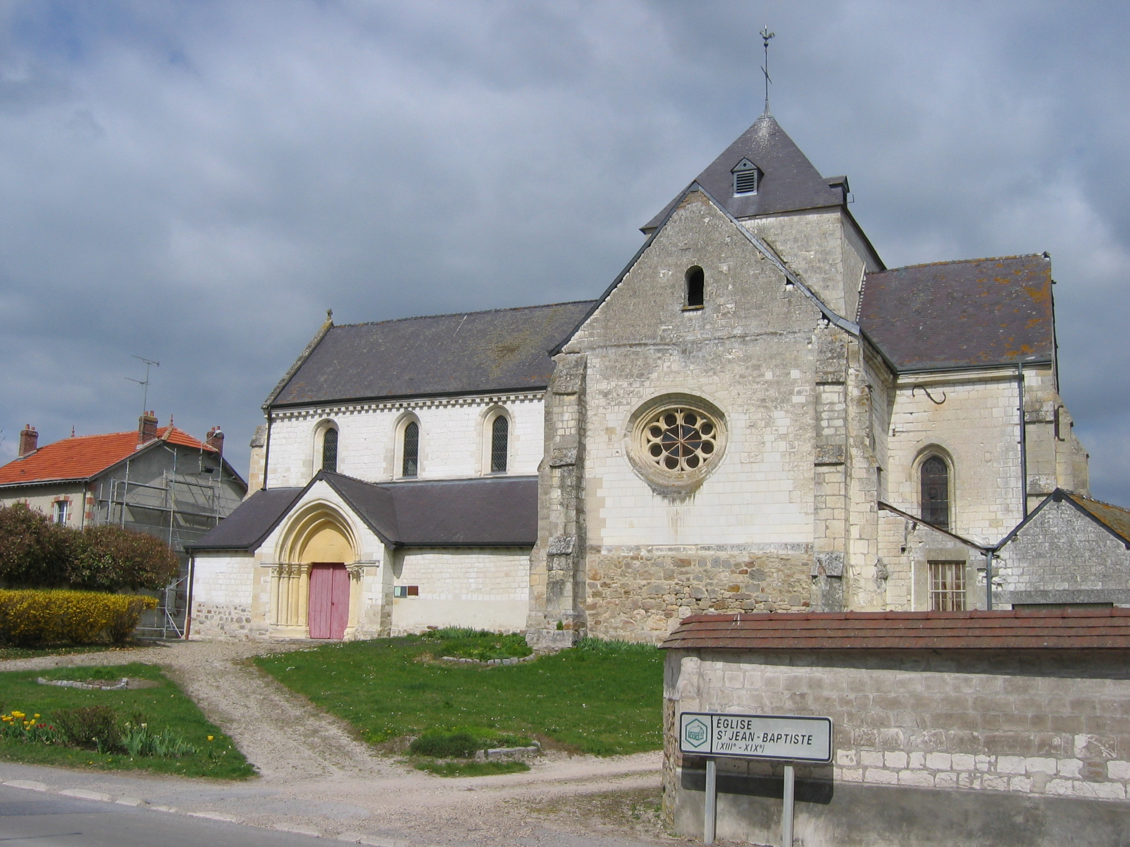 Église Saint-Jean-Baptiste de Brienne sur Aisne - Ardennes - France